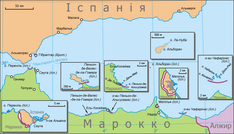 Карта іспанських володінь у Північній Африці (українською мовою)